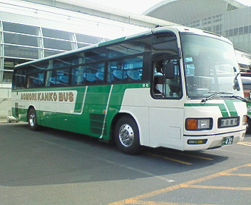 青森観光バス 三菱ふそう・エアロバスクイーンバージョン（P-MS729S） 八戸駅西口にて